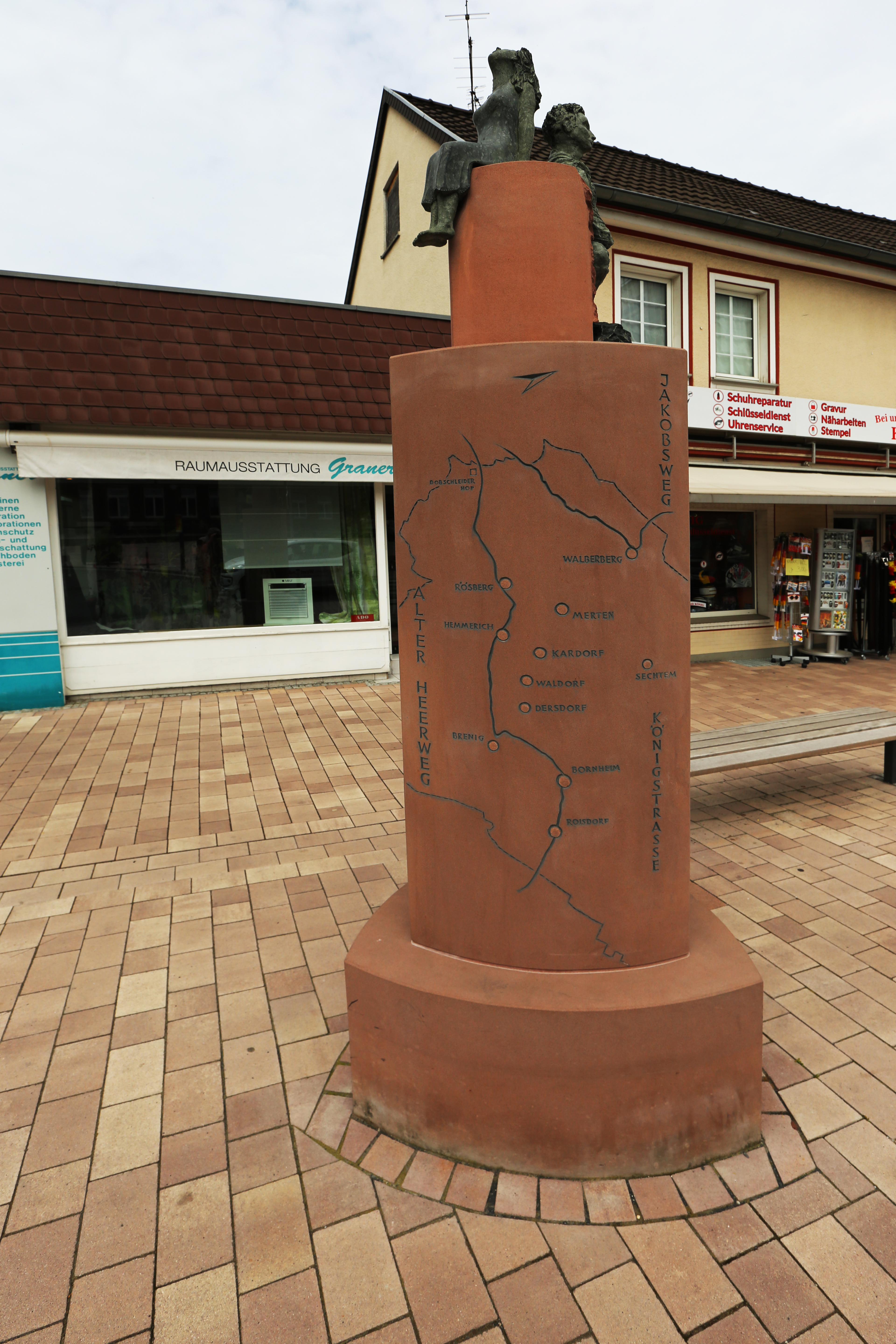 Bornheim, Helmut Sistig, Bildhauer aus Walberberg (Bornheim), schuf im Auftrag der Stadt eine Stele mit dem Titel „Die Wanderer“. Sie wurde an der Königstraße, gegenüber dem Peter-Fryns-Platz, im Frühjahr 2016 errichtet